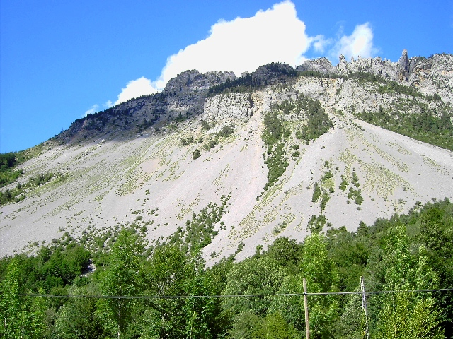 Aragonés: Una tartera en a valle de Pineta (Sobrarbe).